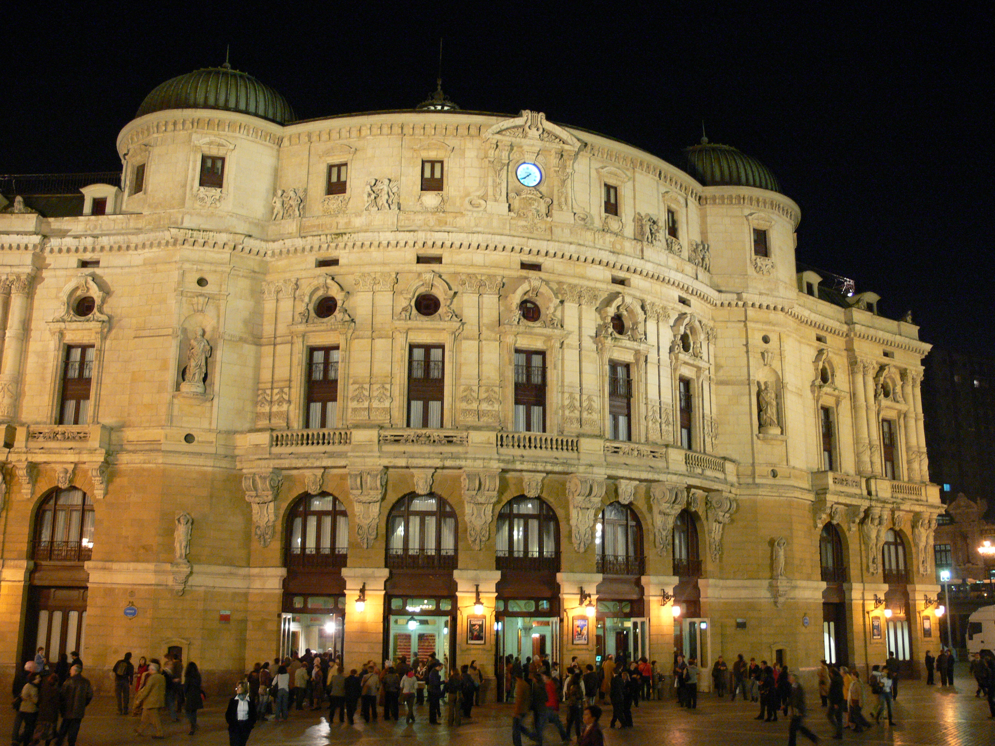 Teatro Arriaga, Bilbao.